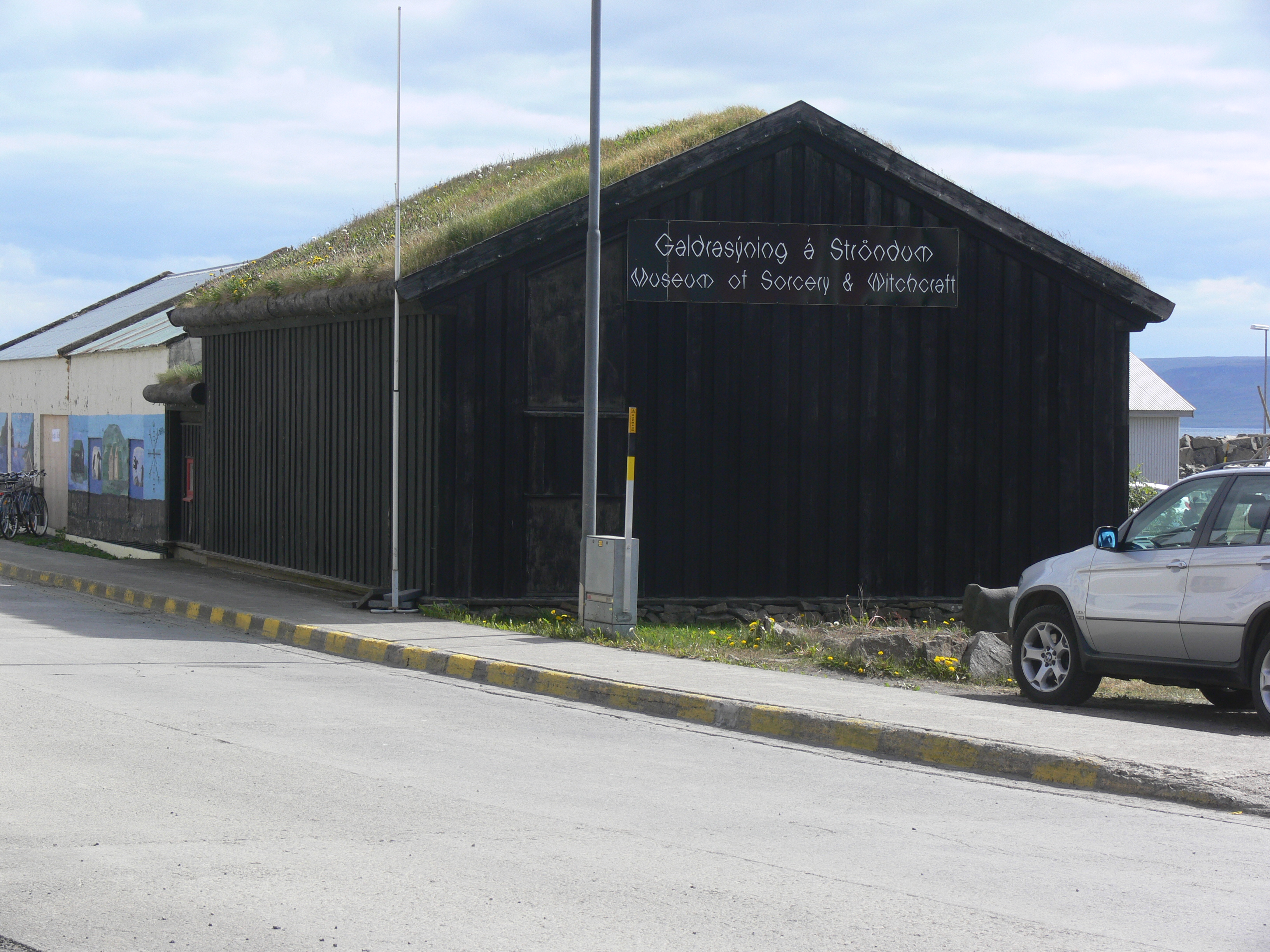 Hólmavík am Steingrímsfjörður. Zaubereimuseum.